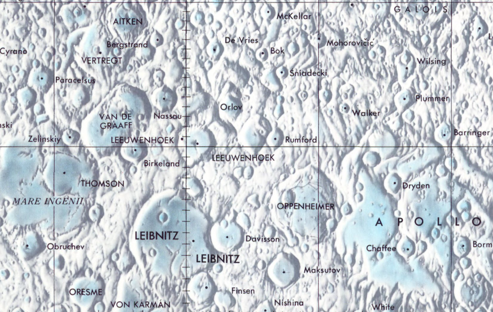 Cráter lunar Rumford. Localización. (Lunar Chart LPC1. Second Edition)